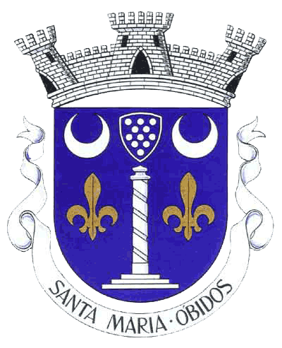 Brasao da freguesia de santa maria